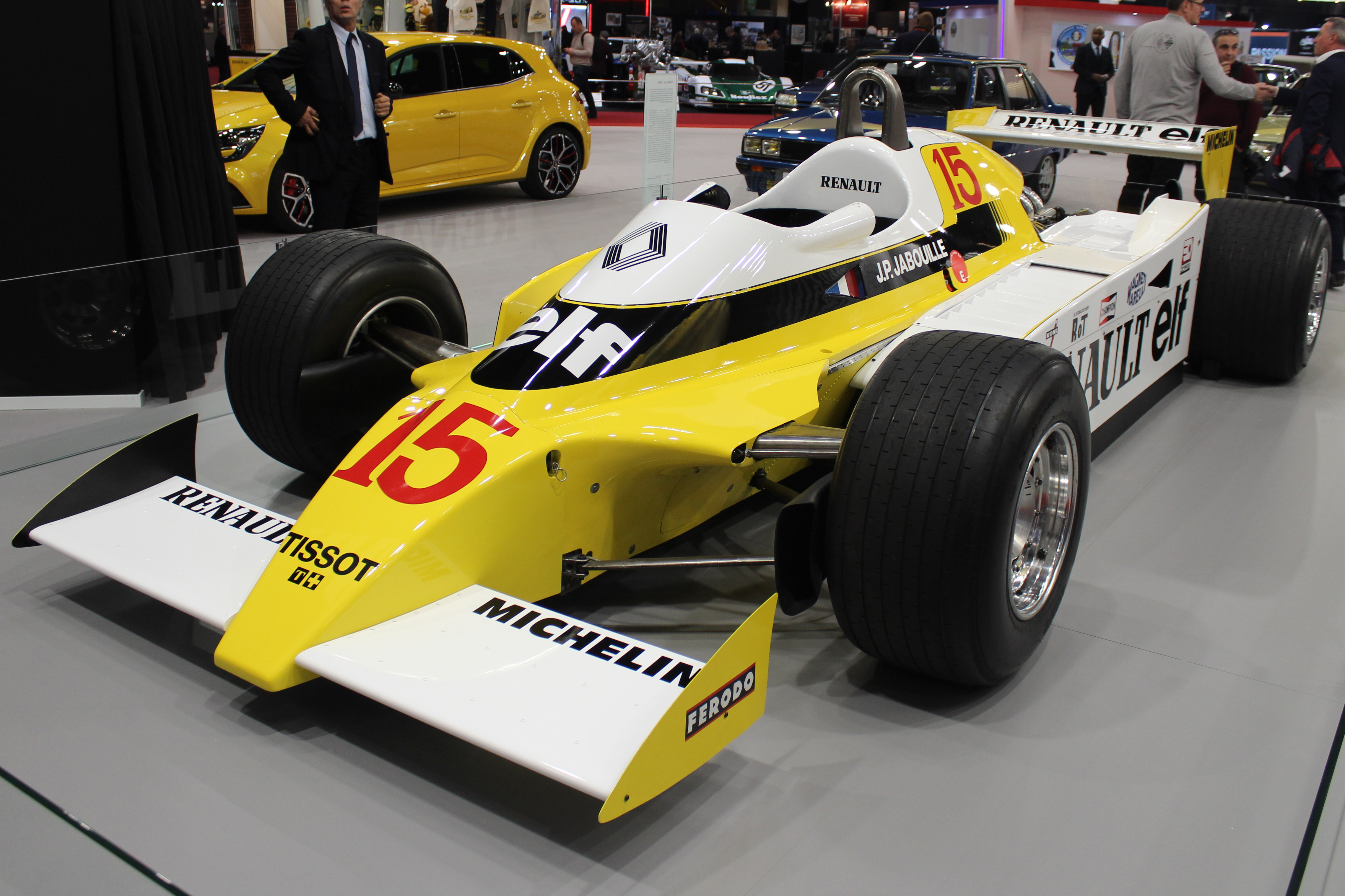 Exposition Renault Turbo à Rétromobile 2019